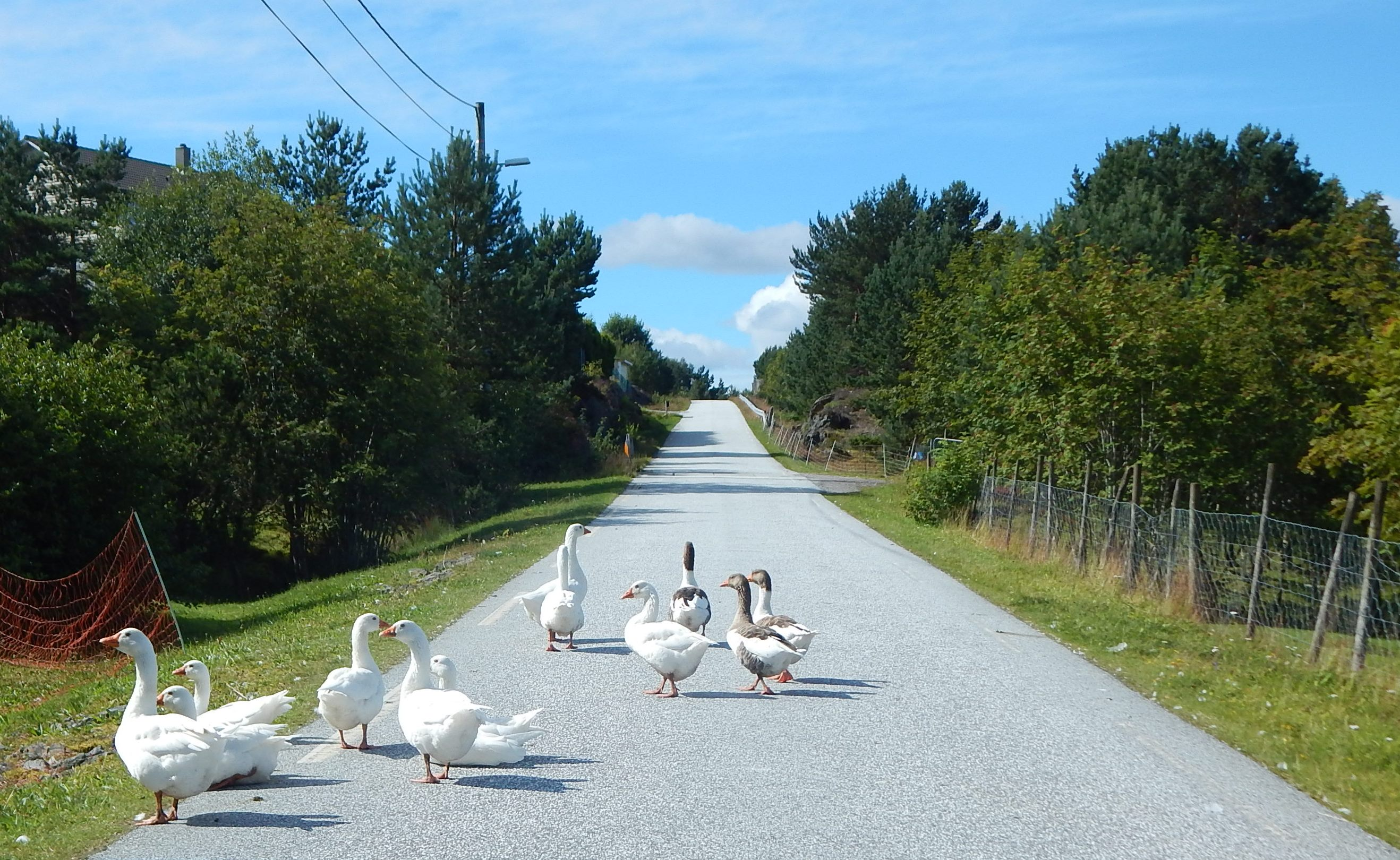 Gjess på fylkesvei 65 sør for Folkestad